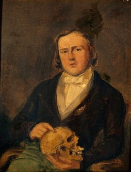 Augustus Bozzi Granville (1783-1872), britischer Arzt italienischer Abstammung